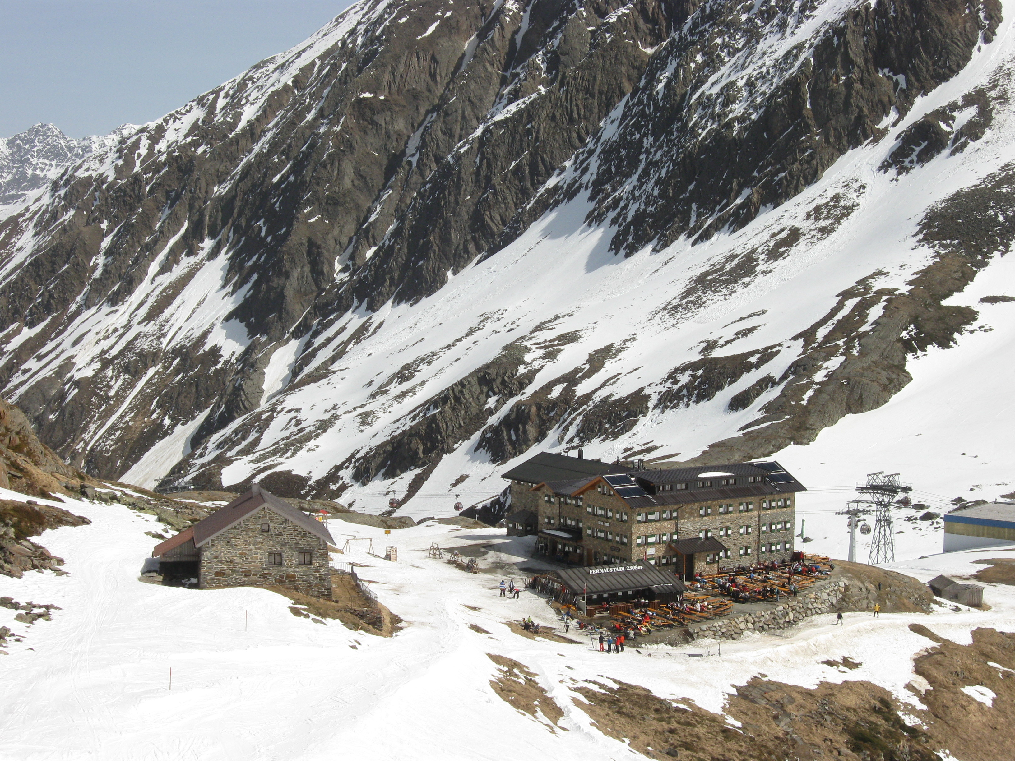 Die im unteren Bereich des Stubaier Gletschers gelegene Dresdner Hütte